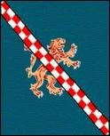 Bandera de Sobrado, en La Coruña (España)